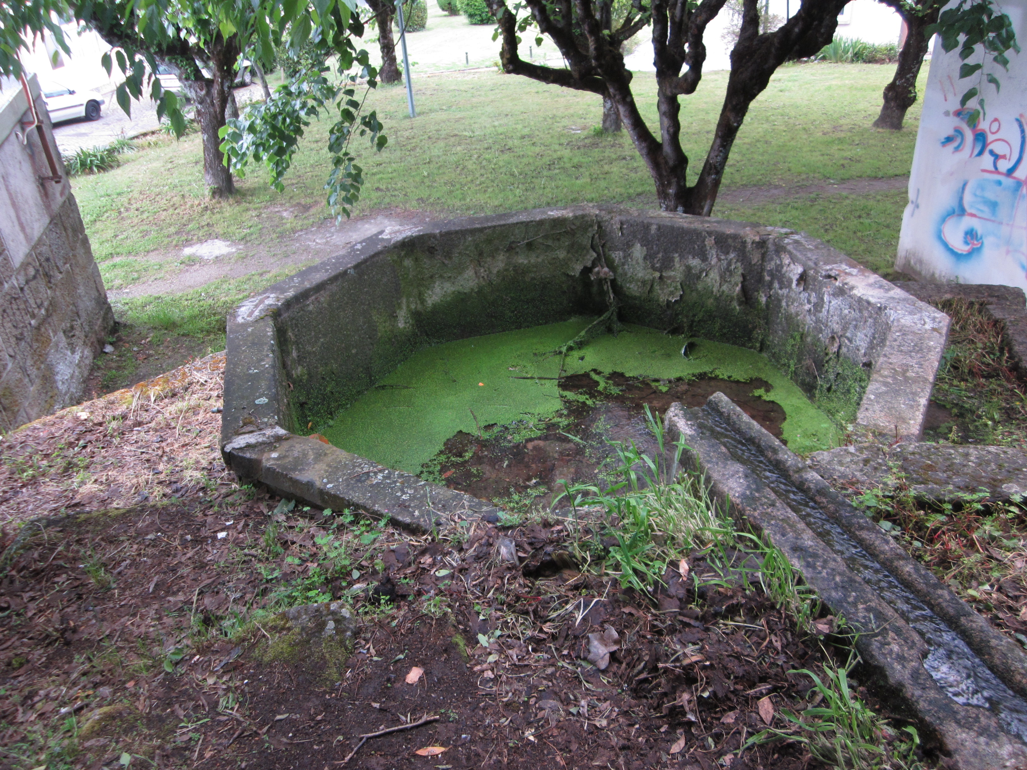 Vista de cima do tanque oitavado que ainda permanece da quinta da Regueira